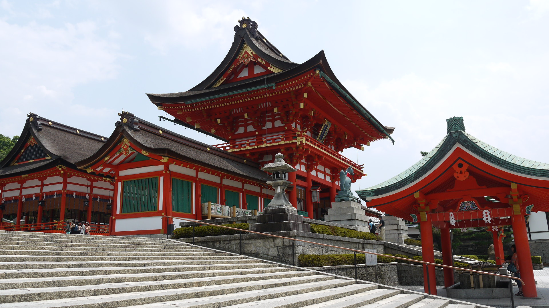 Fushimi Inari Shrine 伏見稲荷大社1